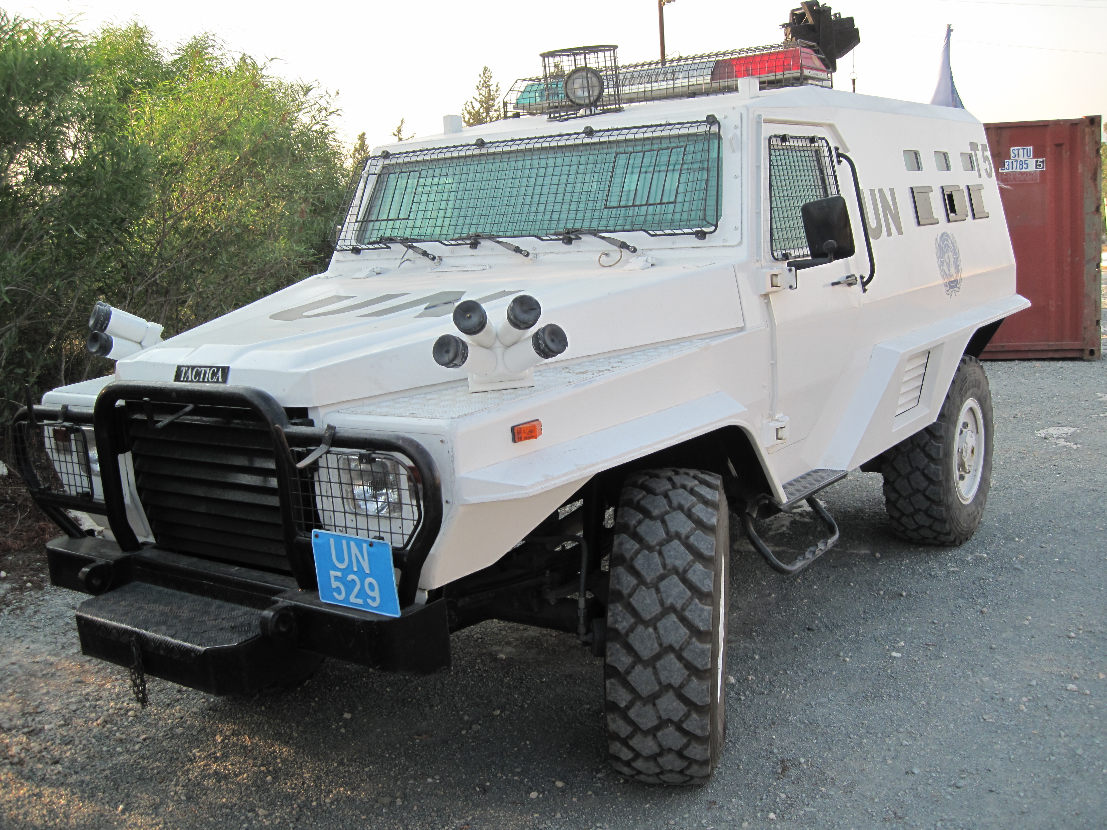 UN auto op Cyprus